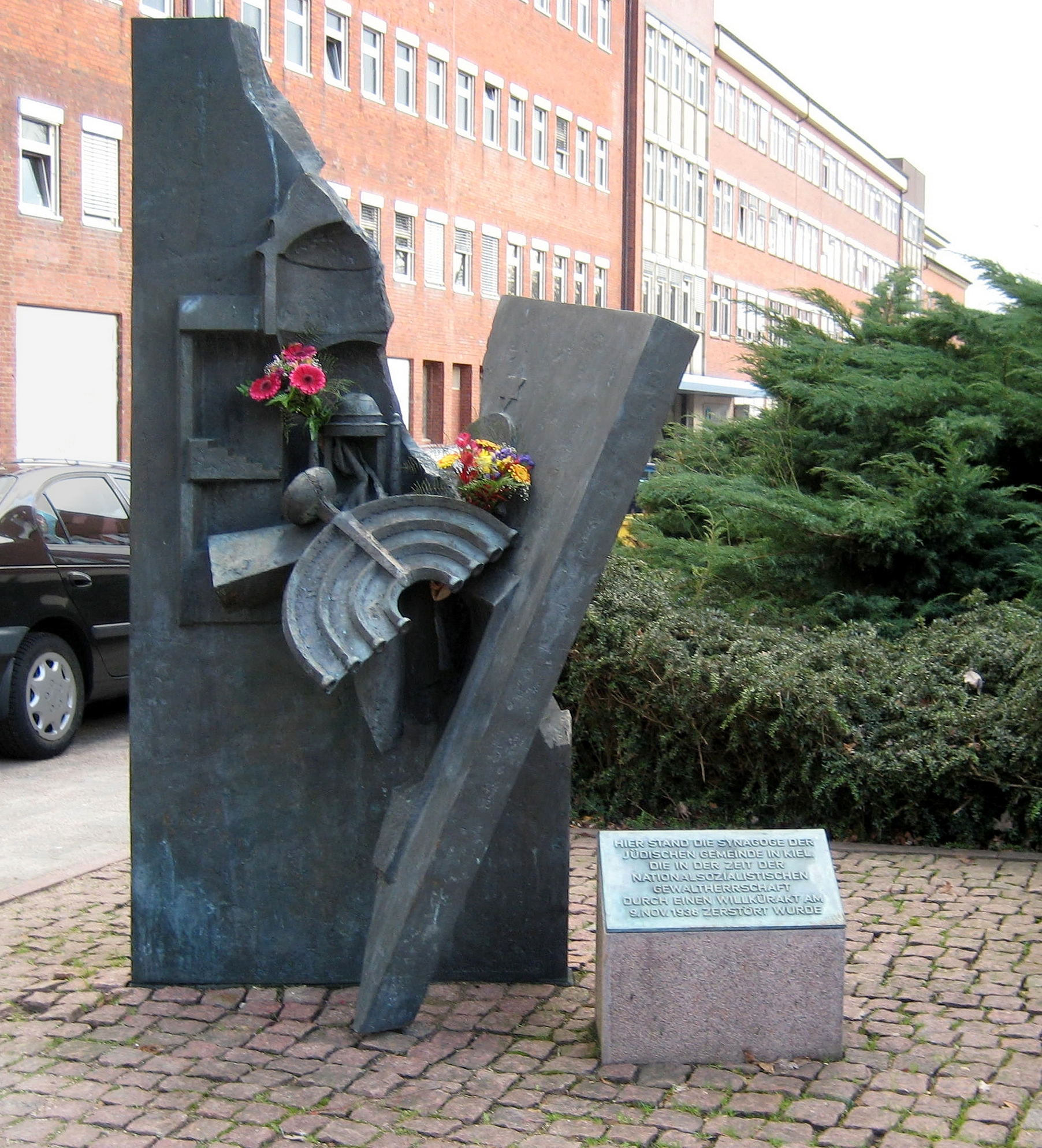 Mahnmal zur Erinnerung an die Zerstörung der Kieler Synagoge Goethestraße während der Reichspogromnacht 1938. Das Mahnmal wurde 1989 von der Bildhauerin Doris Waschk-Balz geschaffen, wobei eine Gedenktafel von 1968 mit in das Mahnmal integriert wurde und sich seitdem auf einem niedrigen Natursteinsockel neben dem Mahnmal befindet.Diese Gedenktafel befand sich vorher an dem Mehrfamilienwohnhaus, mit dem das frühere Synagogengrundstück in den 1960er-Jahren neu bebaut worden war.Standort: Auf dem ehemaligen Grundstück der Synagoge in der Goethestraße/Ecke Humboldtstraße in Kiel-Schreventeich in Schleswig-Holstein, Deutschland.